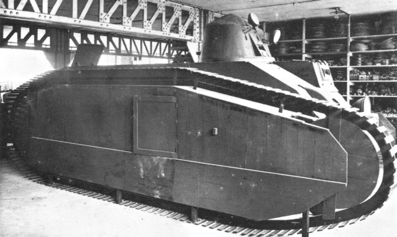 Elektronische reproductie van foto van houten maquette Char B-tank